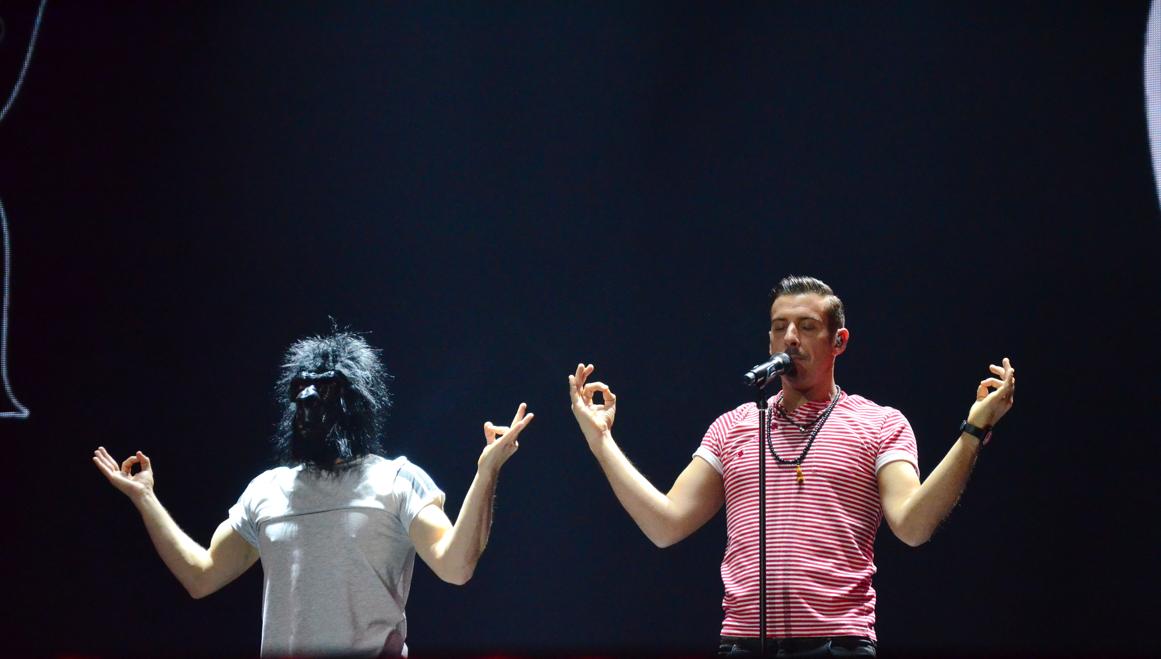 12 травня. Генеральна репетиція фіналу Євробачення 2017. Francesco Gabbani (Italy).